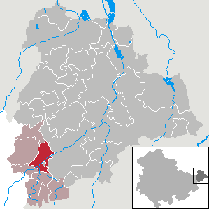 Nöbdenitz in Thuringia - District Altenburger Land